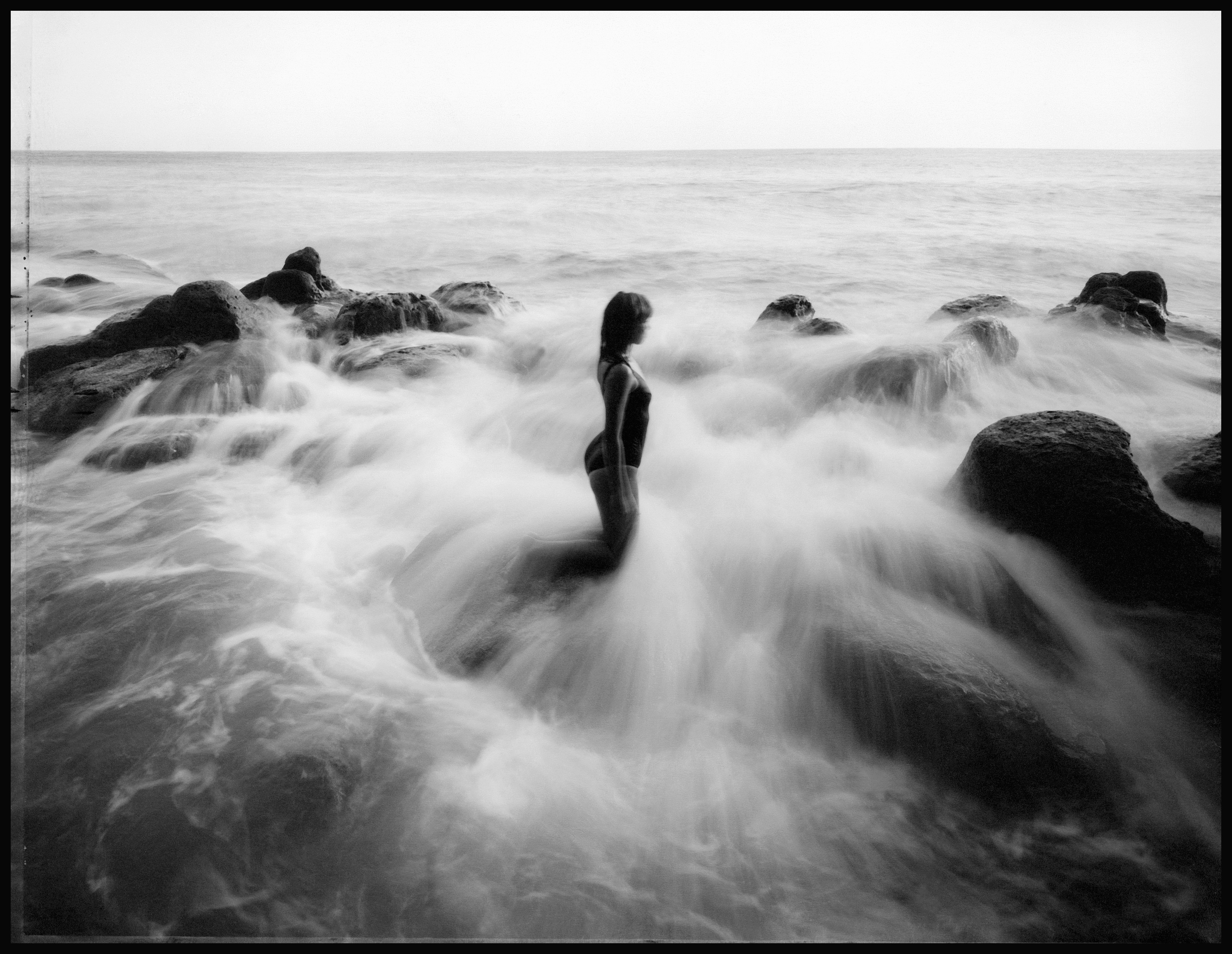 La prima fotografia scattata da un giovane Settimio Benedusi.